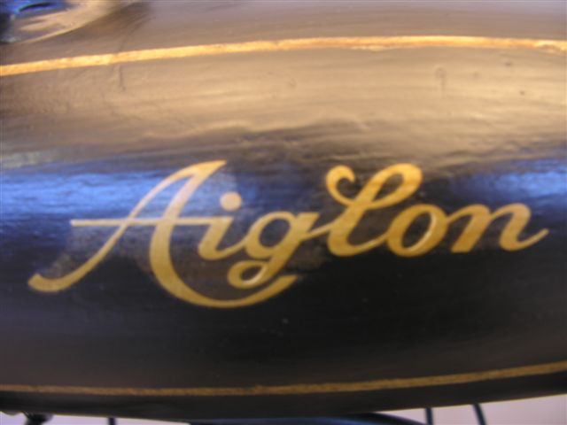 Aiglon tanklogo.